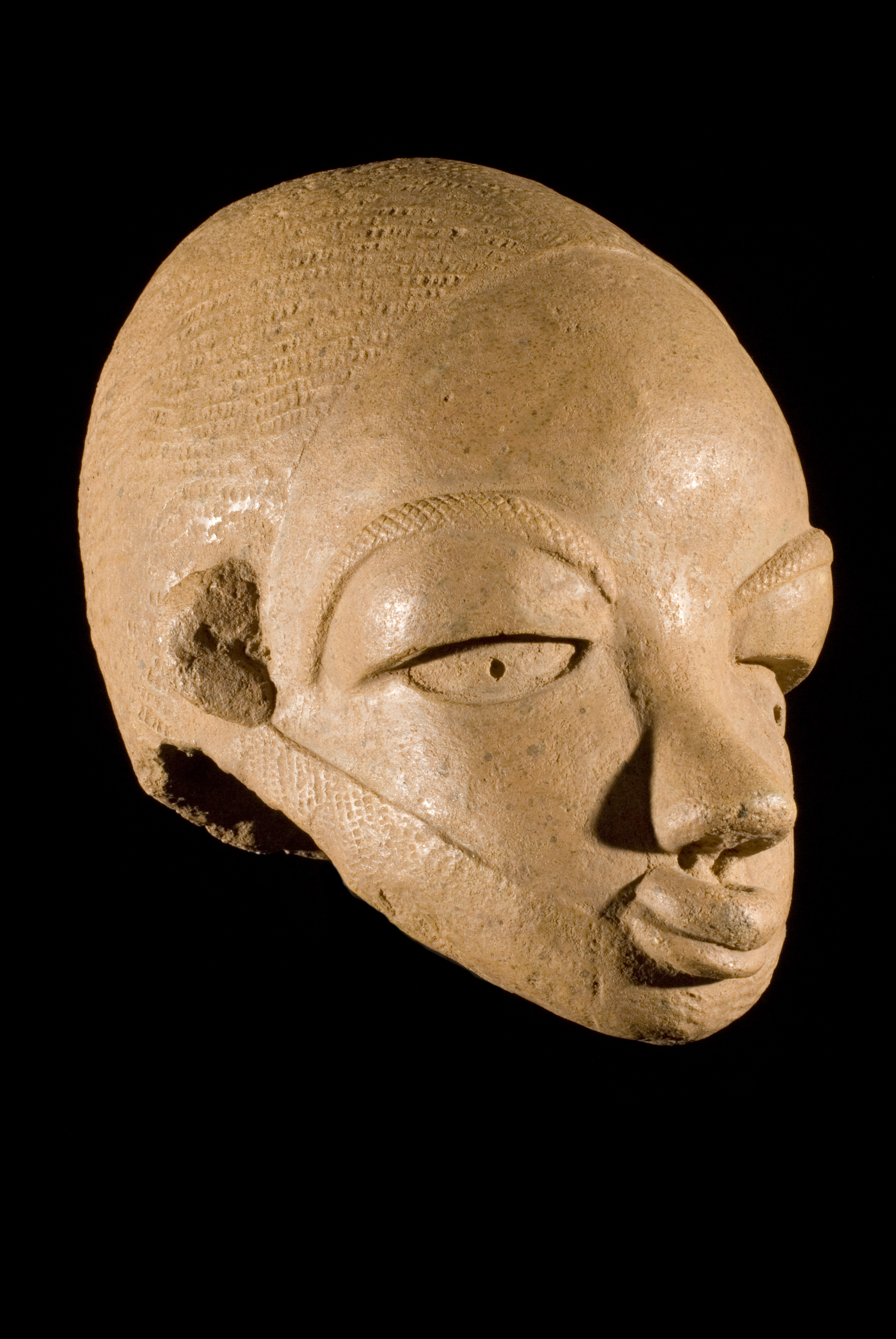 Sala de Renacimiento del Museo de Arte Africano Arellano Alonso